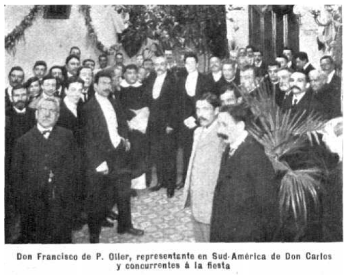 Periodista tradicionalista